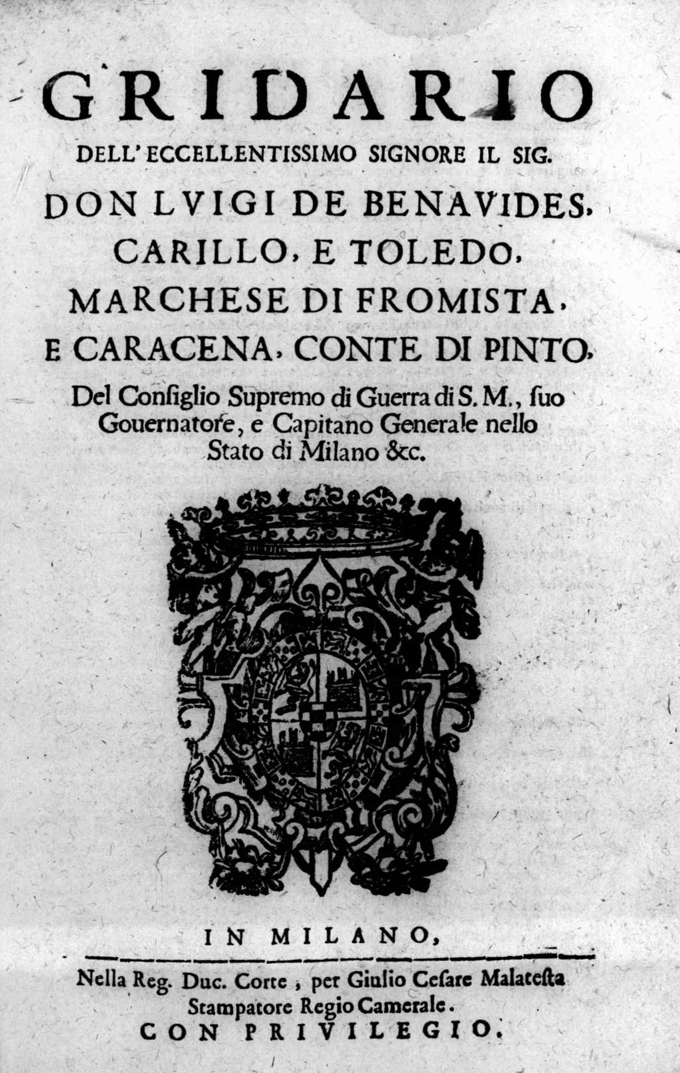 Frontespizio